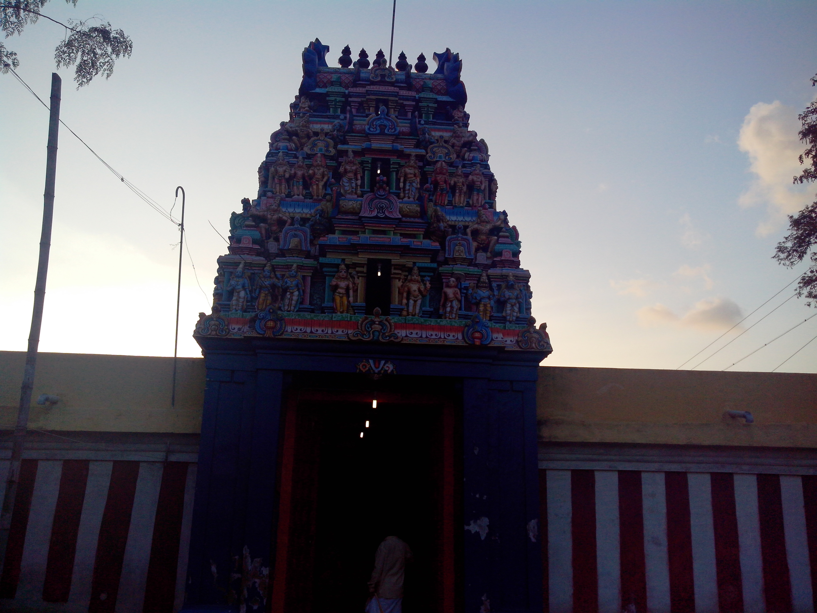 Patteeswaram Kothanda Ramar Temple